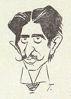 Eduardo Barriobero.